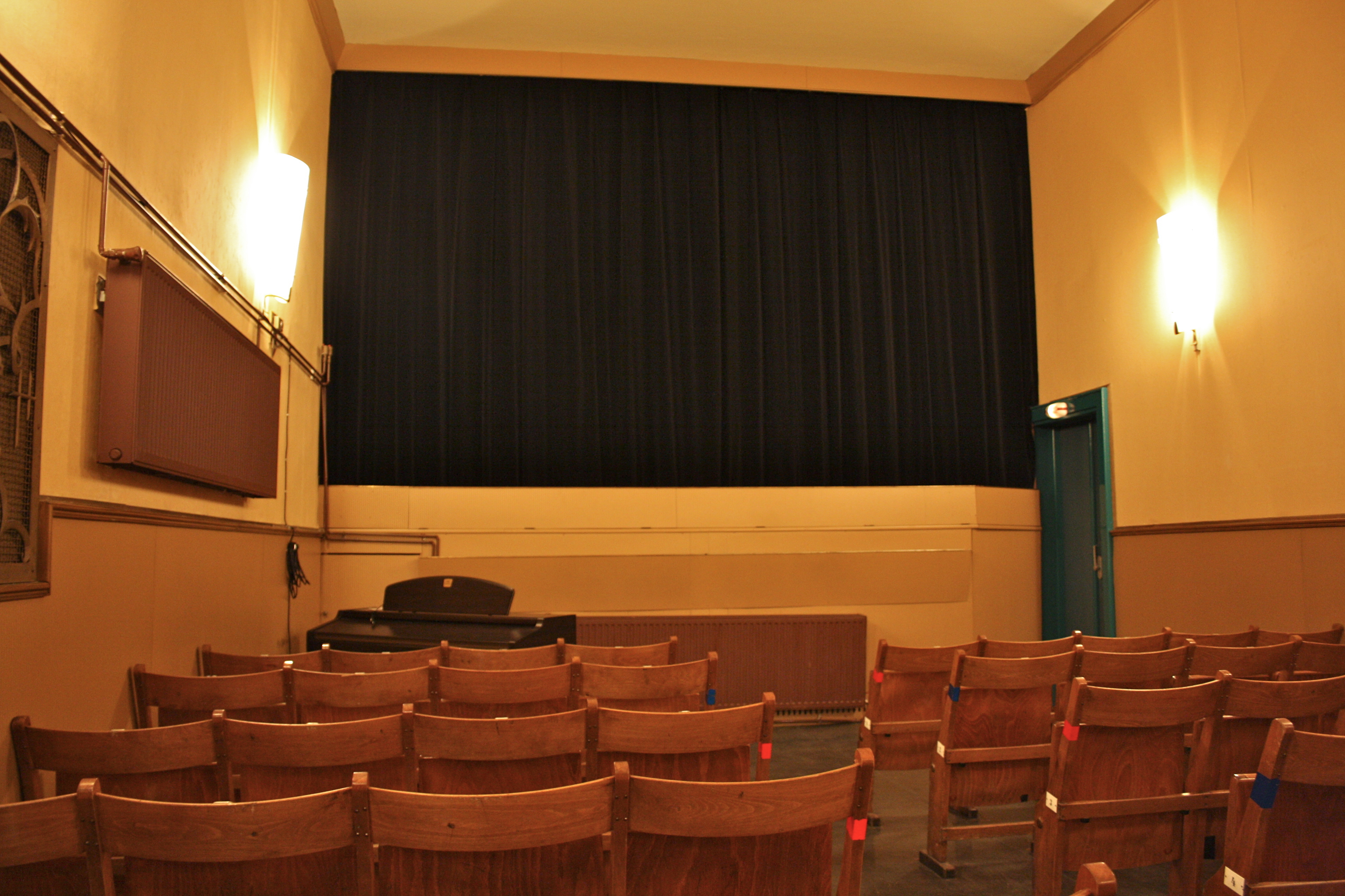 Kinosaal der Breitenseer Lichtspiele in Wien.